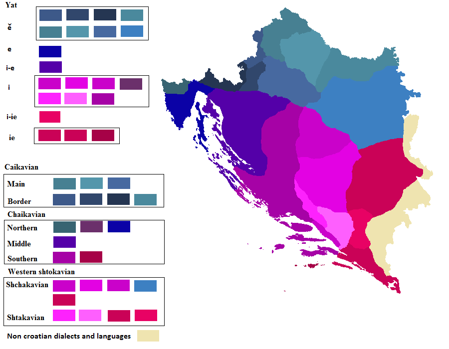 Hrvatski dijalekti po Lukežićki. Dobar prikaz refleksa jata i 3 hr. narječja